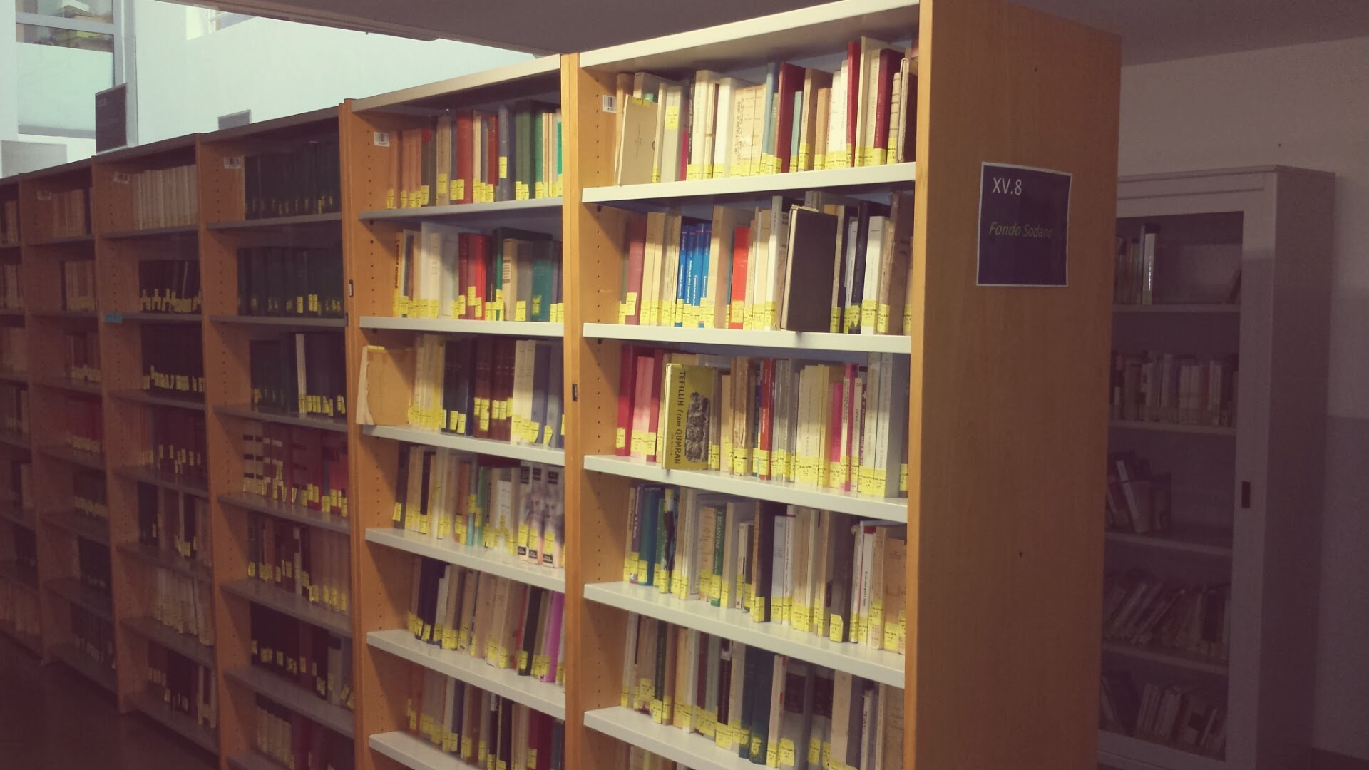 Immagine del Fondo Sodano, conservato presso la Biblioteca E.R. Caianiello dell'Università di Salerno